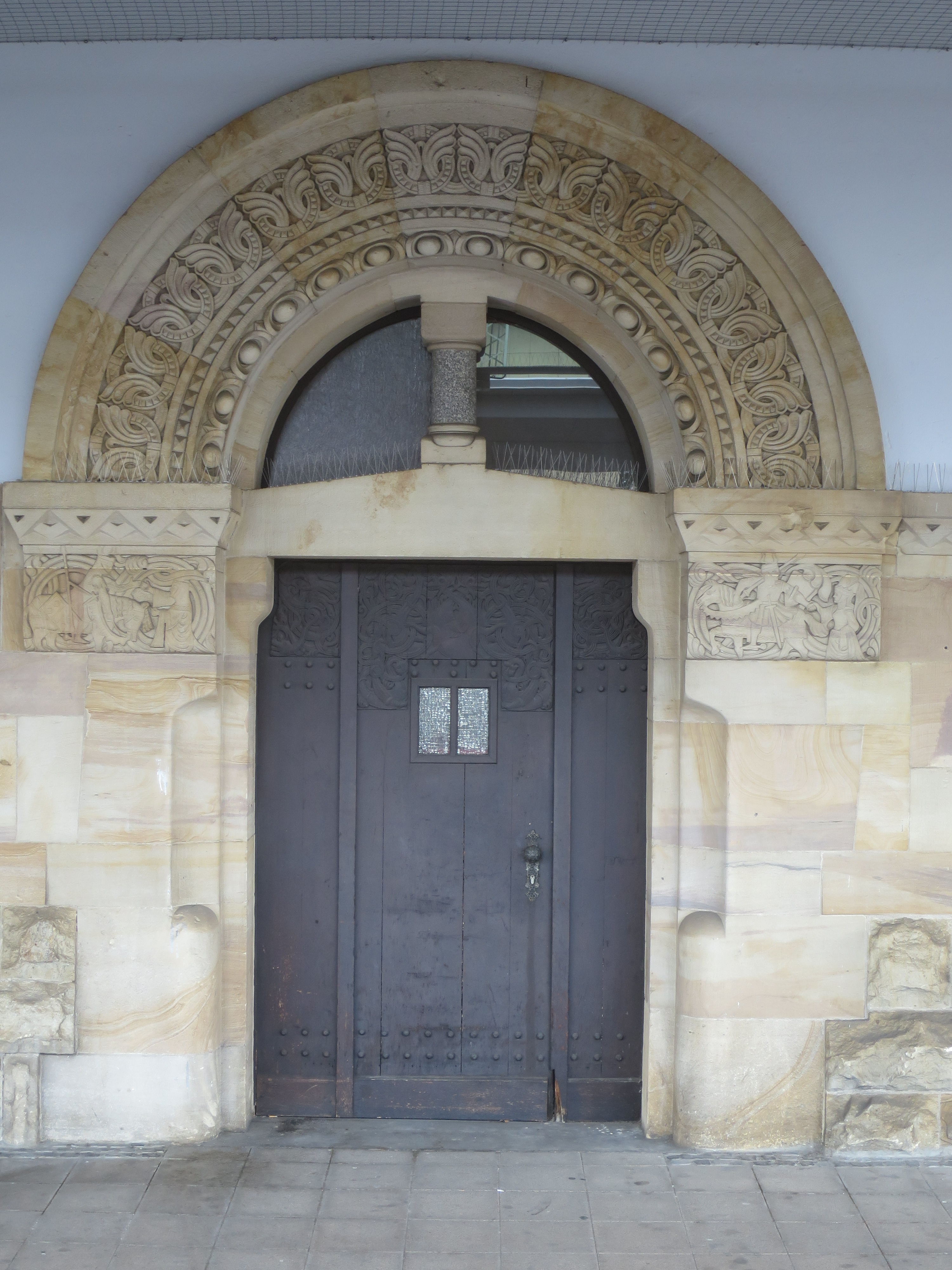 Worms Hauptbahnhof, Tür zur Bahnsteigseite